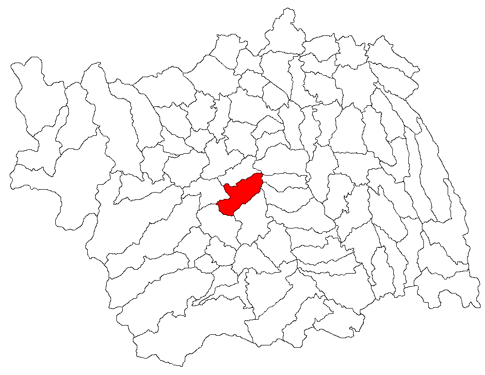 Categorie:Hărţi ale judeţului Bacău